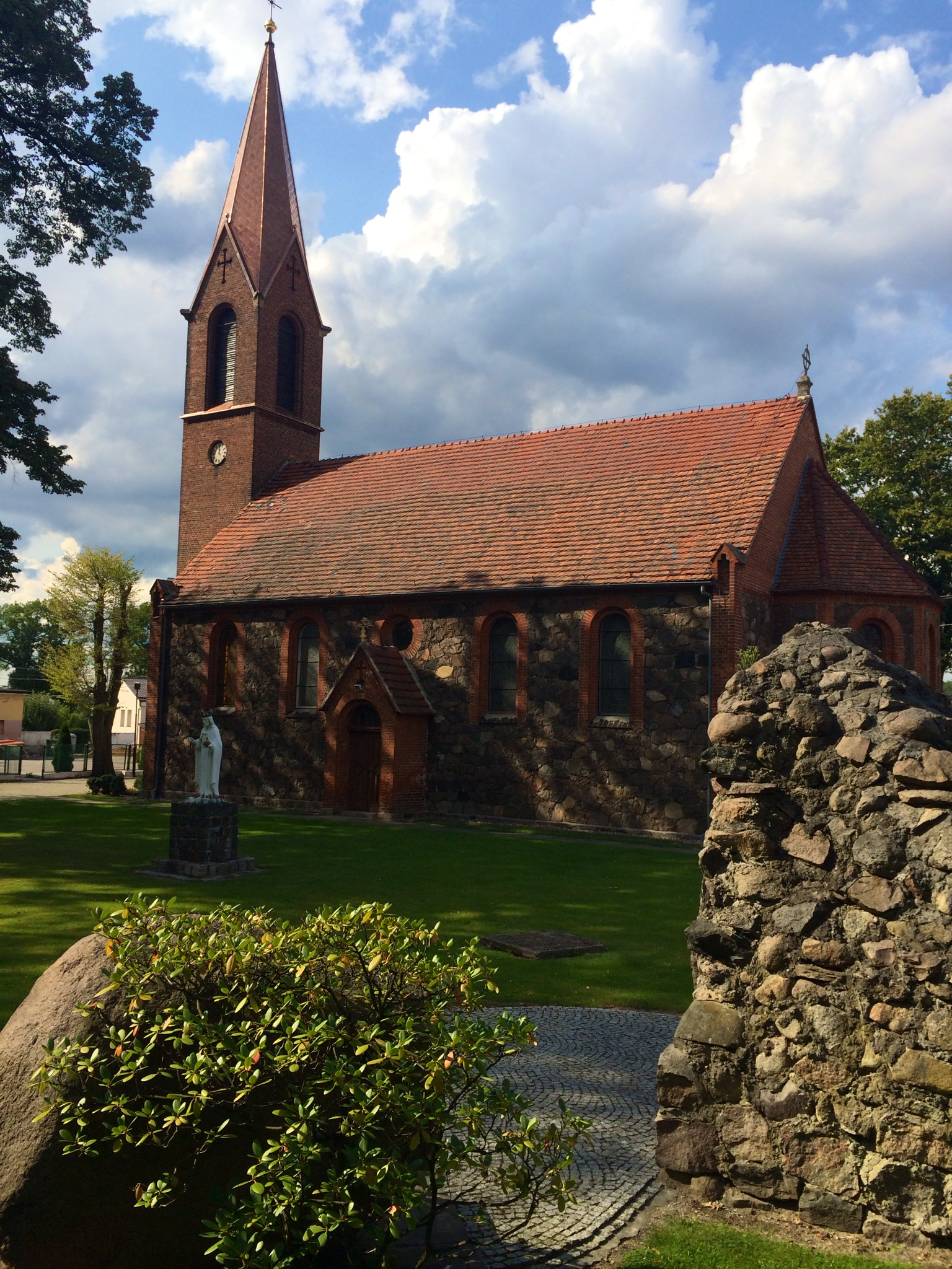 Kościół w Trzemesznie Lubuskim